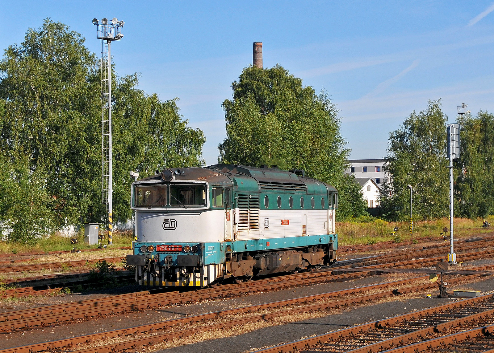 Motorová lokomotiva 750.118 Českých drah na českolipském hlavním nádraží.